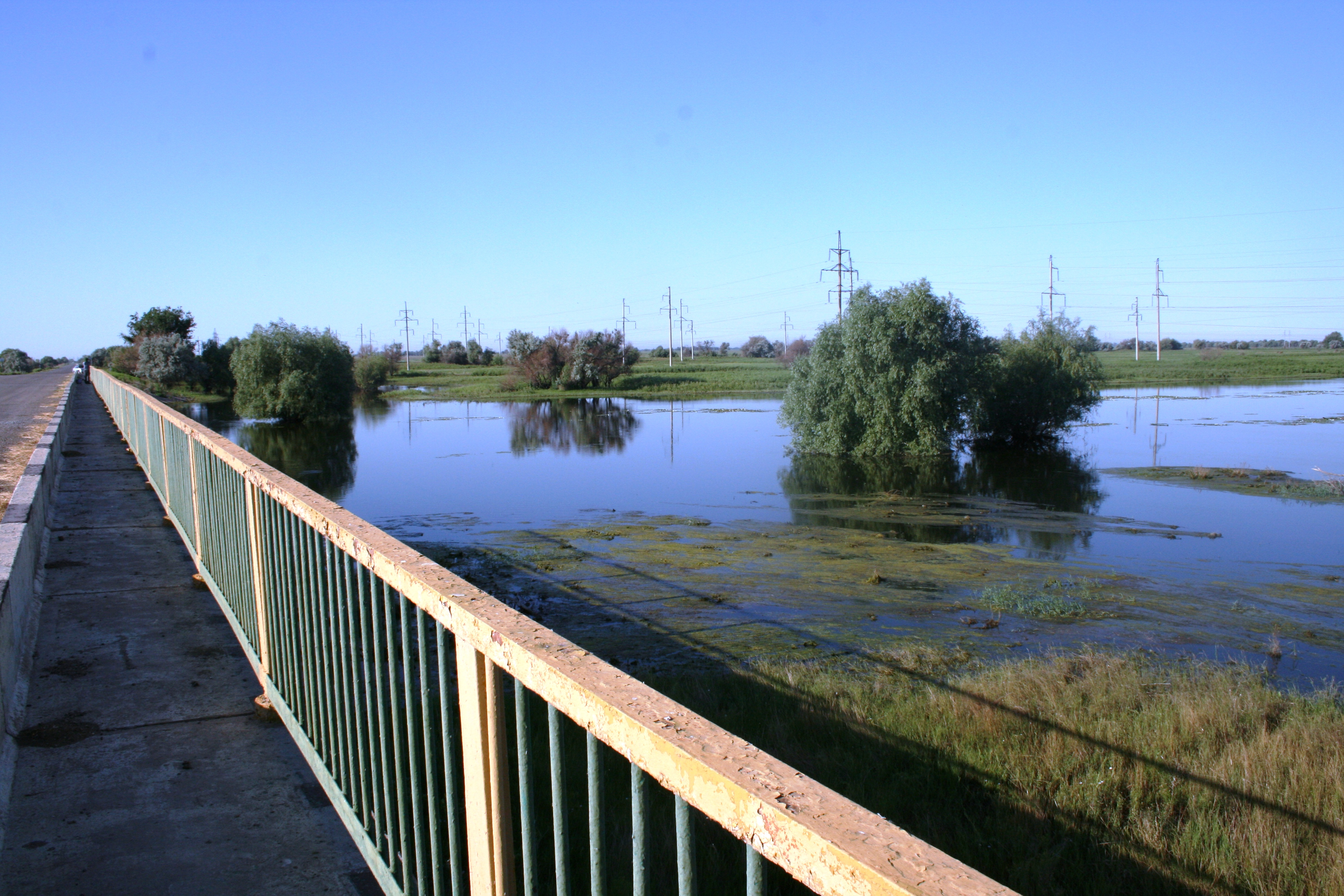 Кривантий.